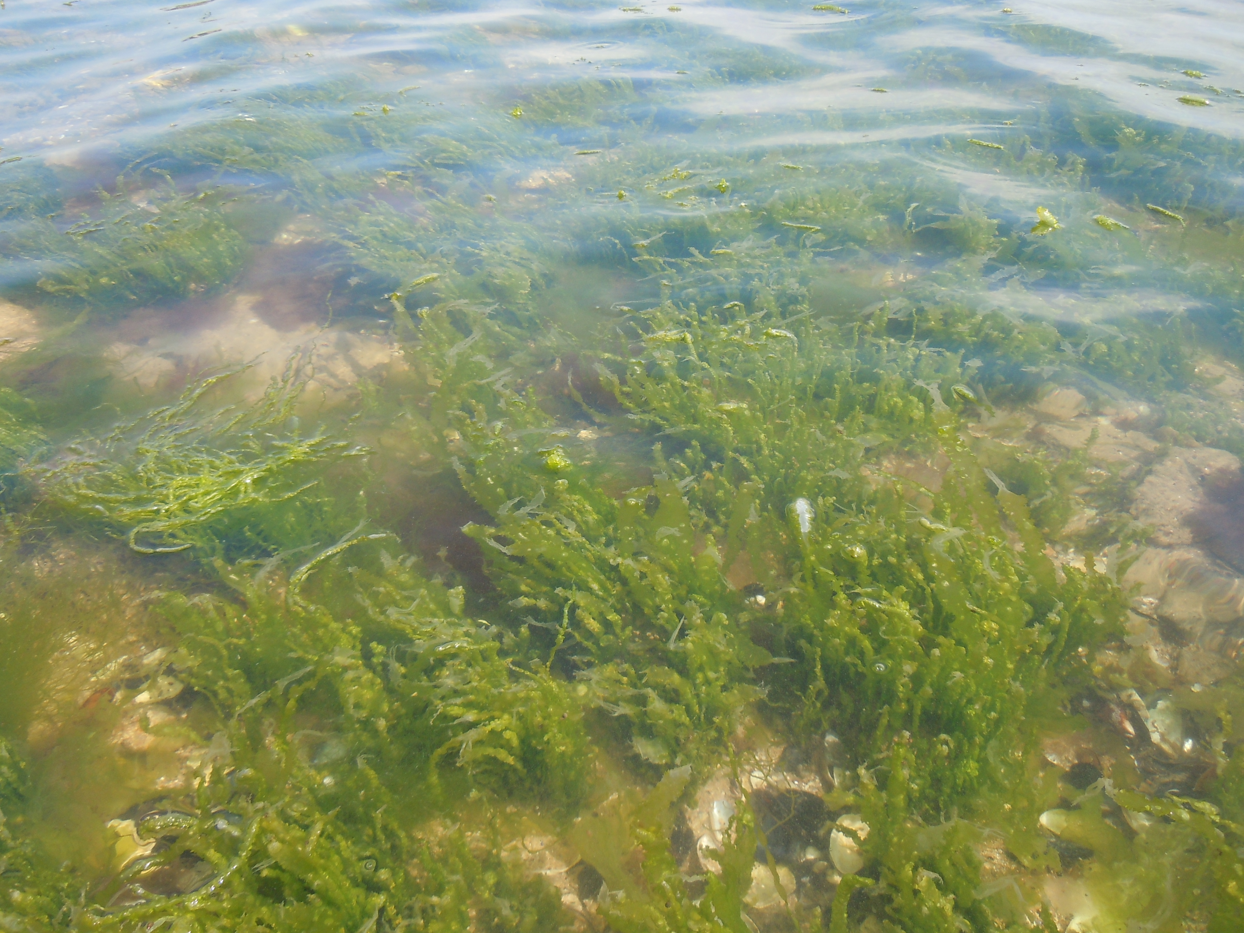 Зарості ентероморфи (Ulva intestinalis) на мілинах Григорівського лиману